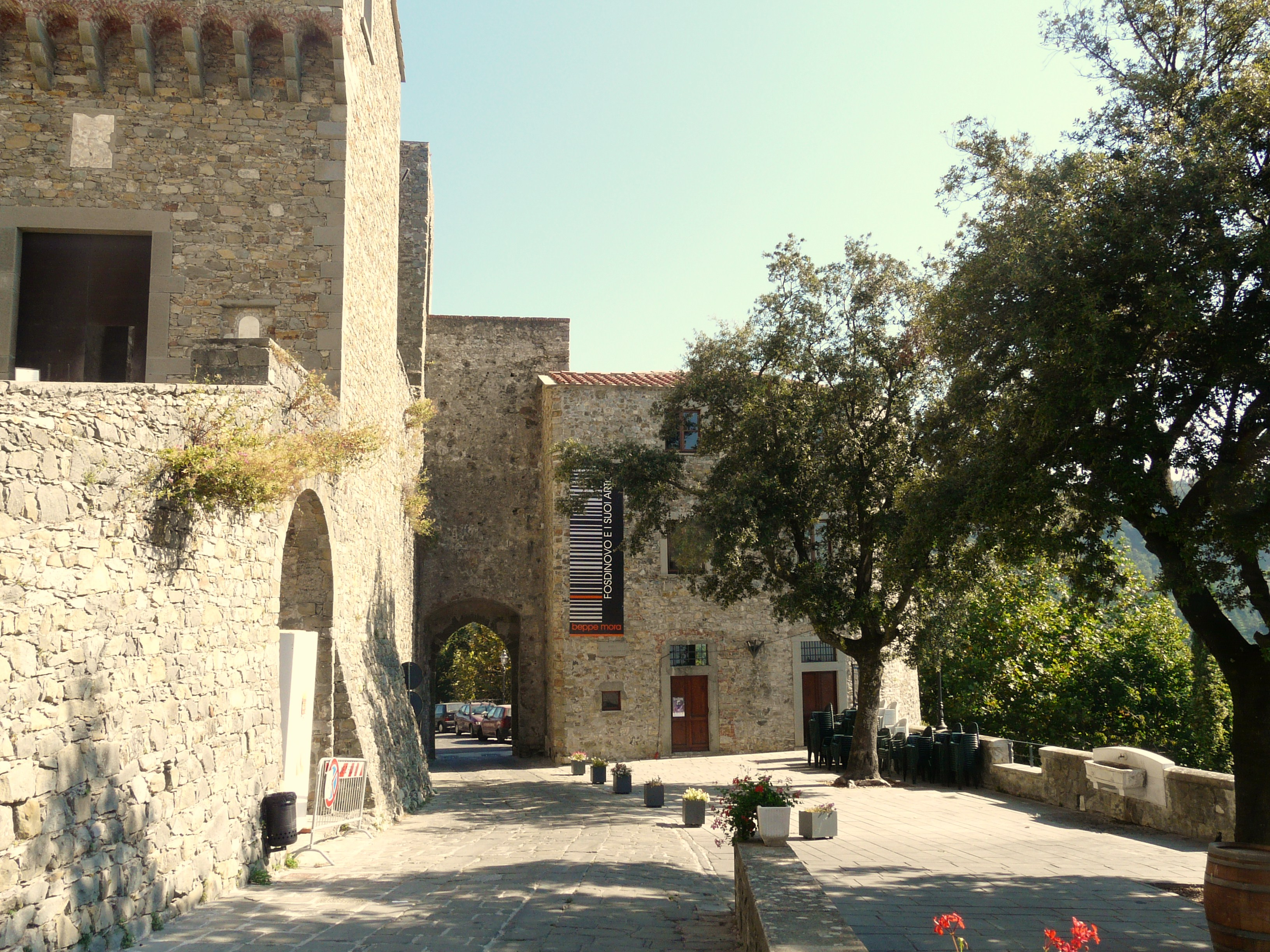 Castello Malaspina, Fosdinovo, Toscana, Italia